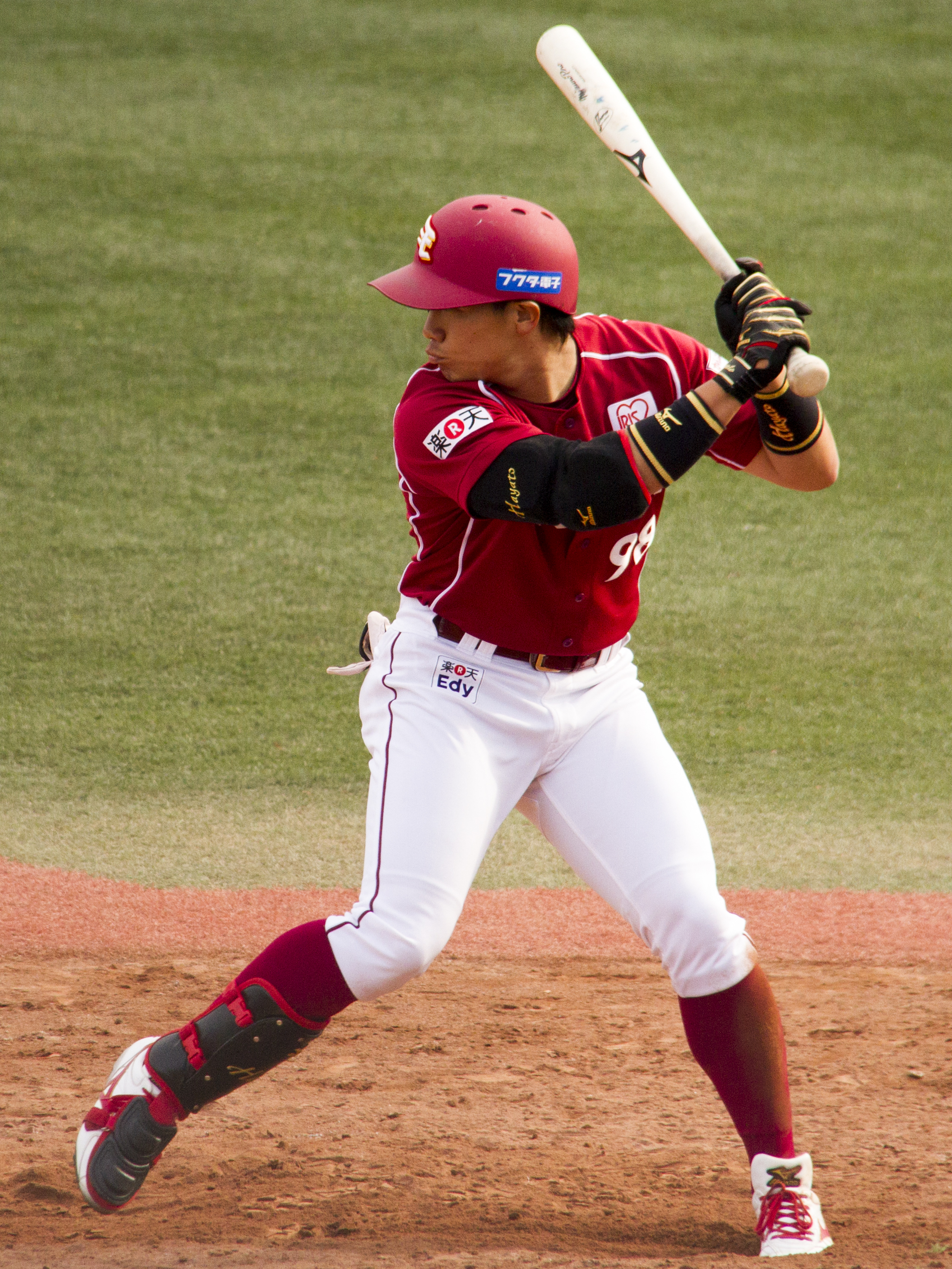 川口隼人 2012年5月13日 横須賀スタジアム